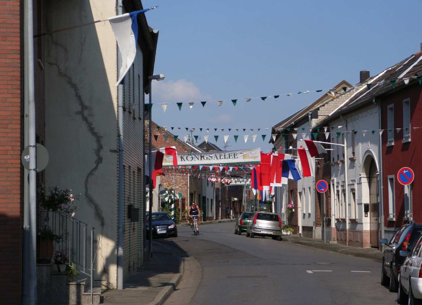 Linnich-Kofferen, Fahnenschmuck zum Schützenfest